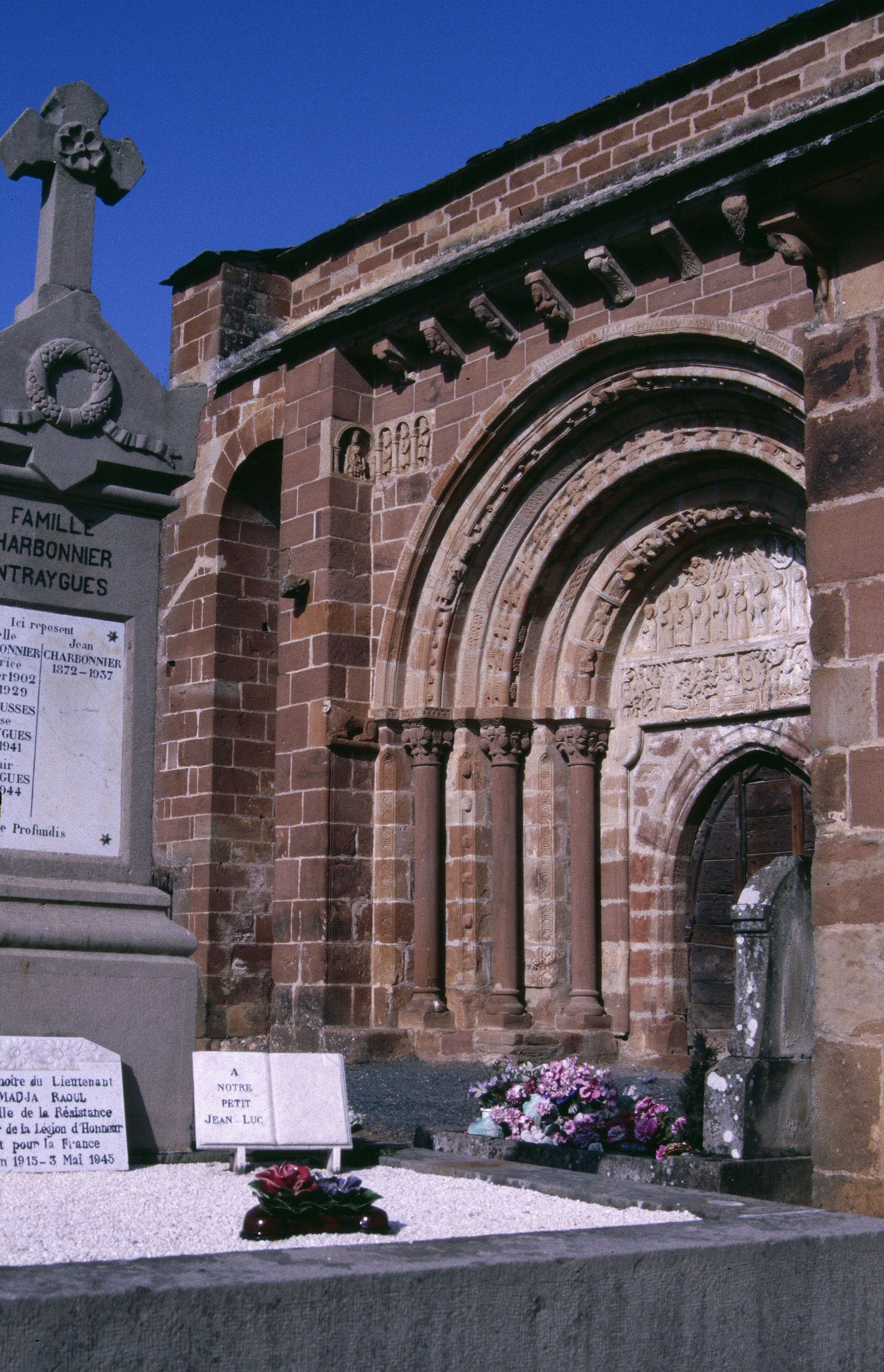 Espalion, St. Hilarian de Perse Portal